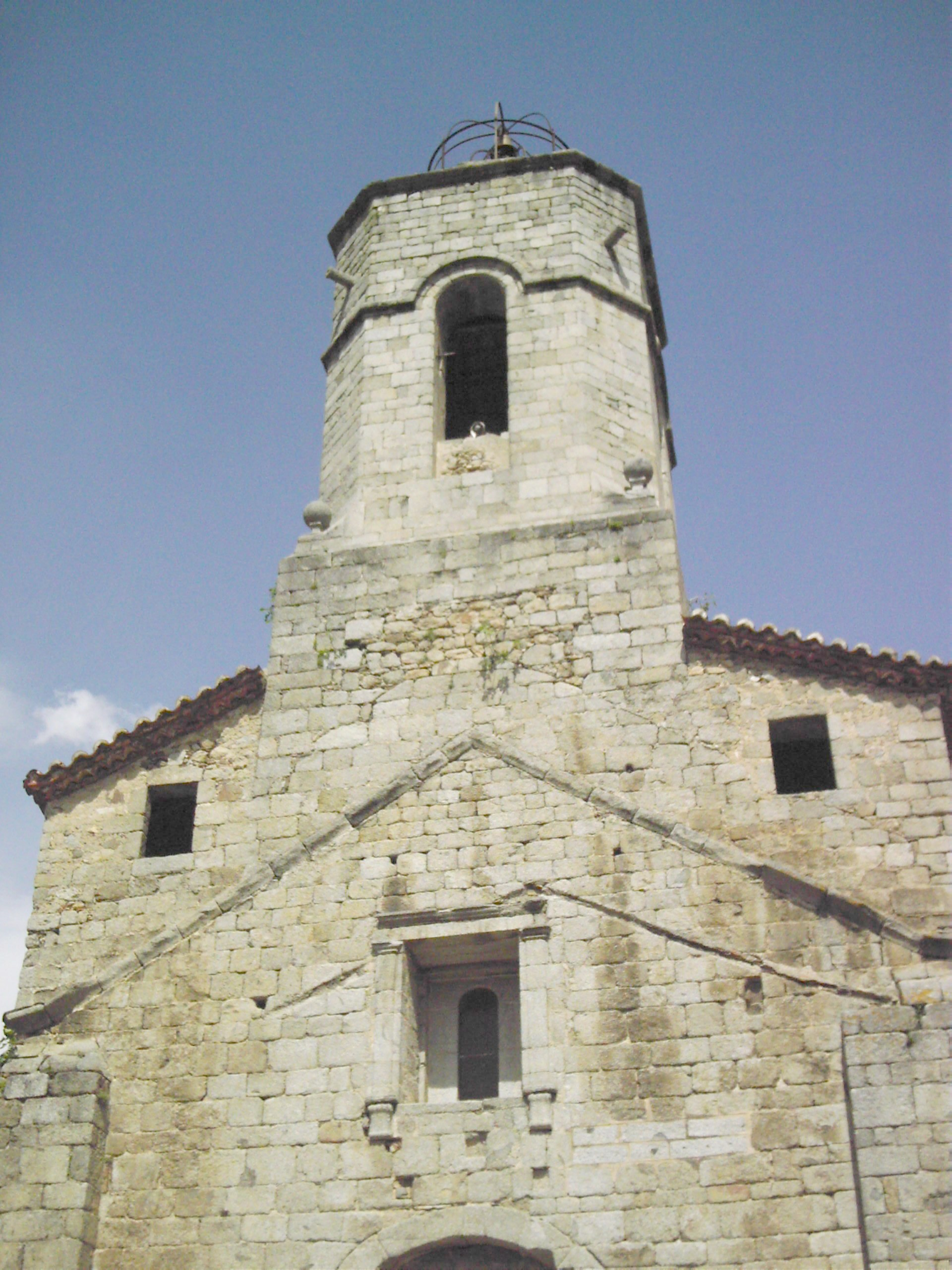 esglèsia st Marti